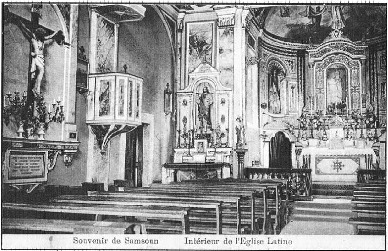 Mater Dolorosa Katolik Kilisesi'nin içten görünümü.